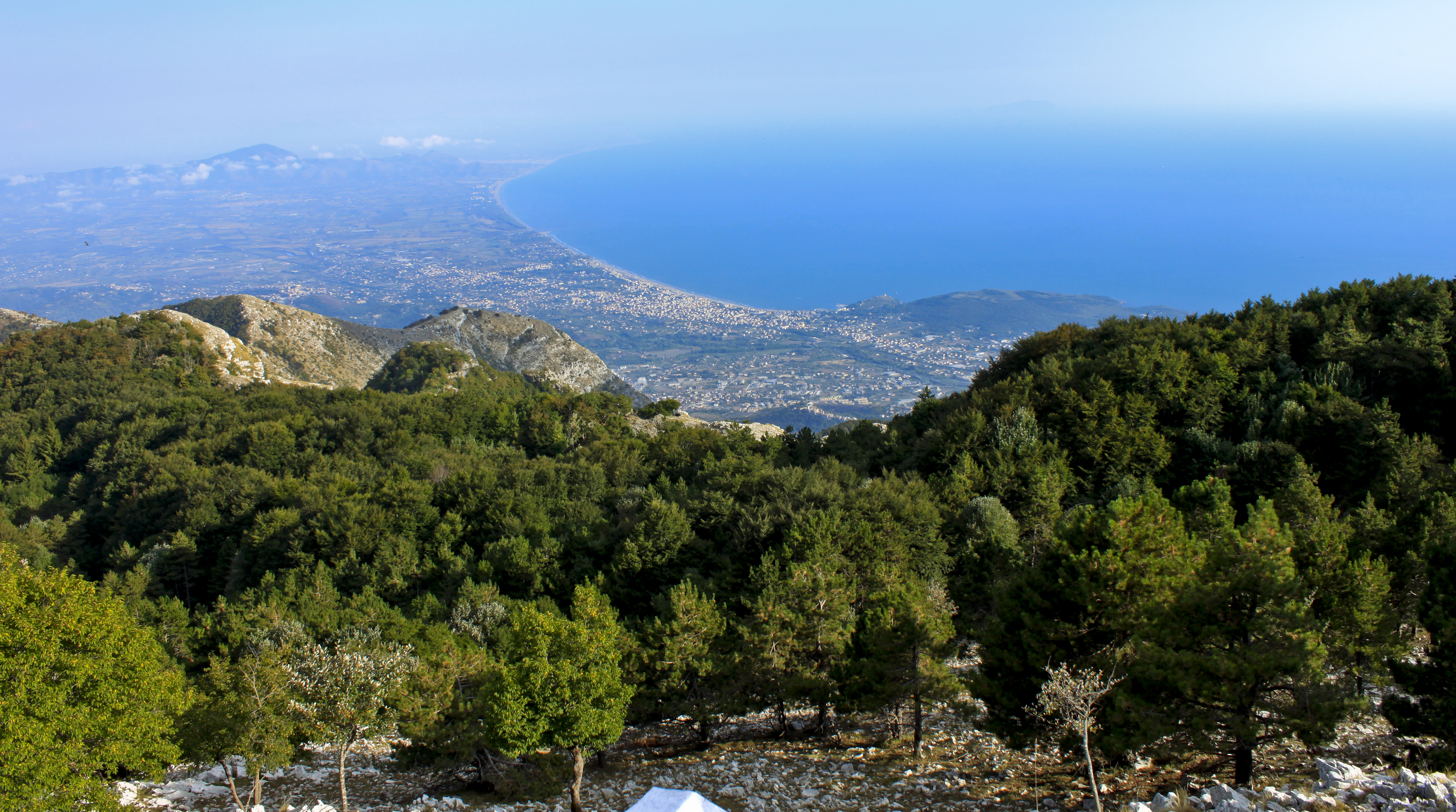 Fotografia di Gabriele Altimari